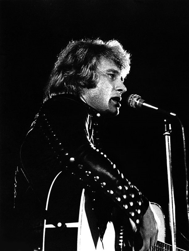 Le chanteur français Johnny Hallyday lors d'un concert à Milan en 1973.